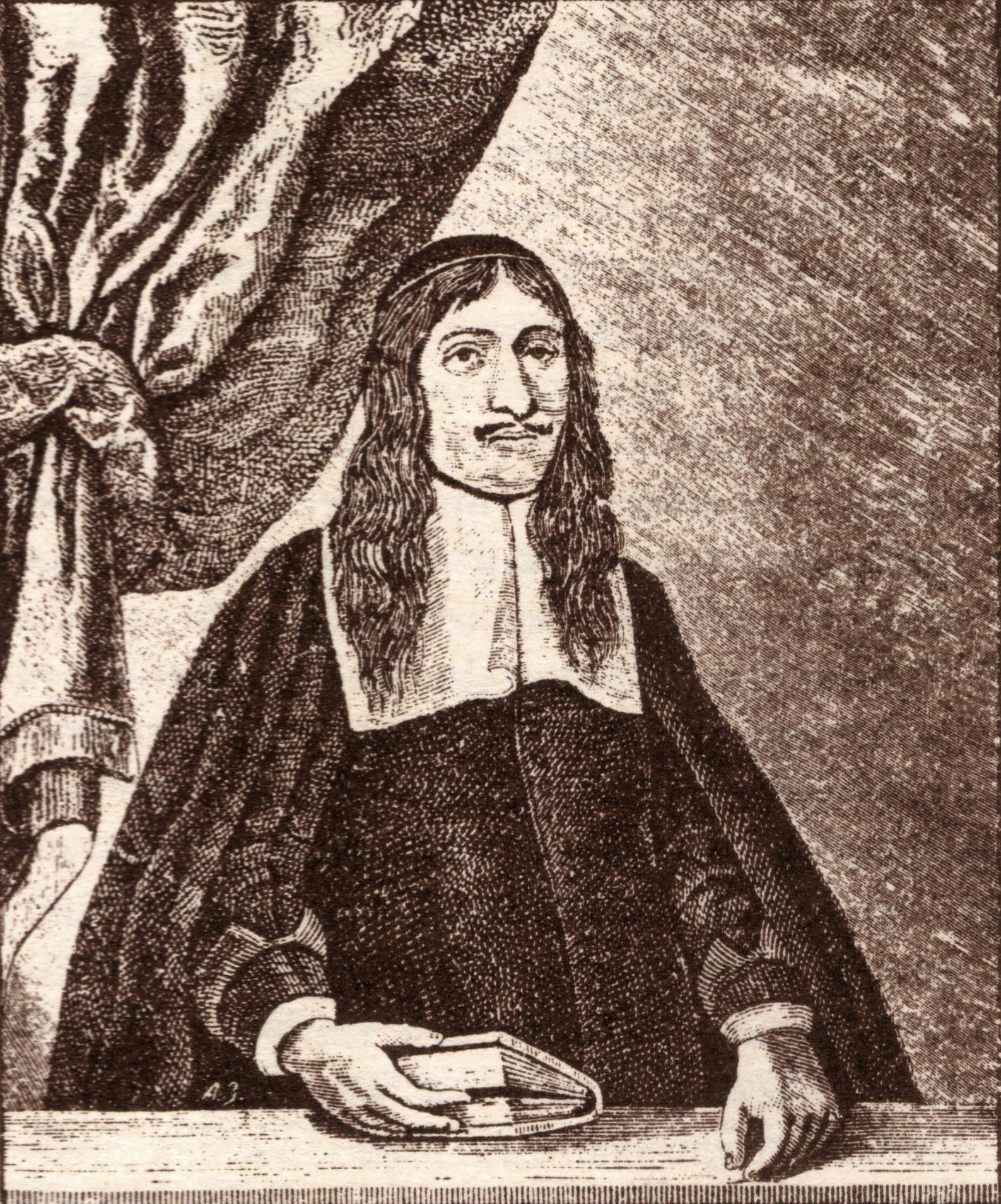 Johann Gottfried Gregory (1631-1675)